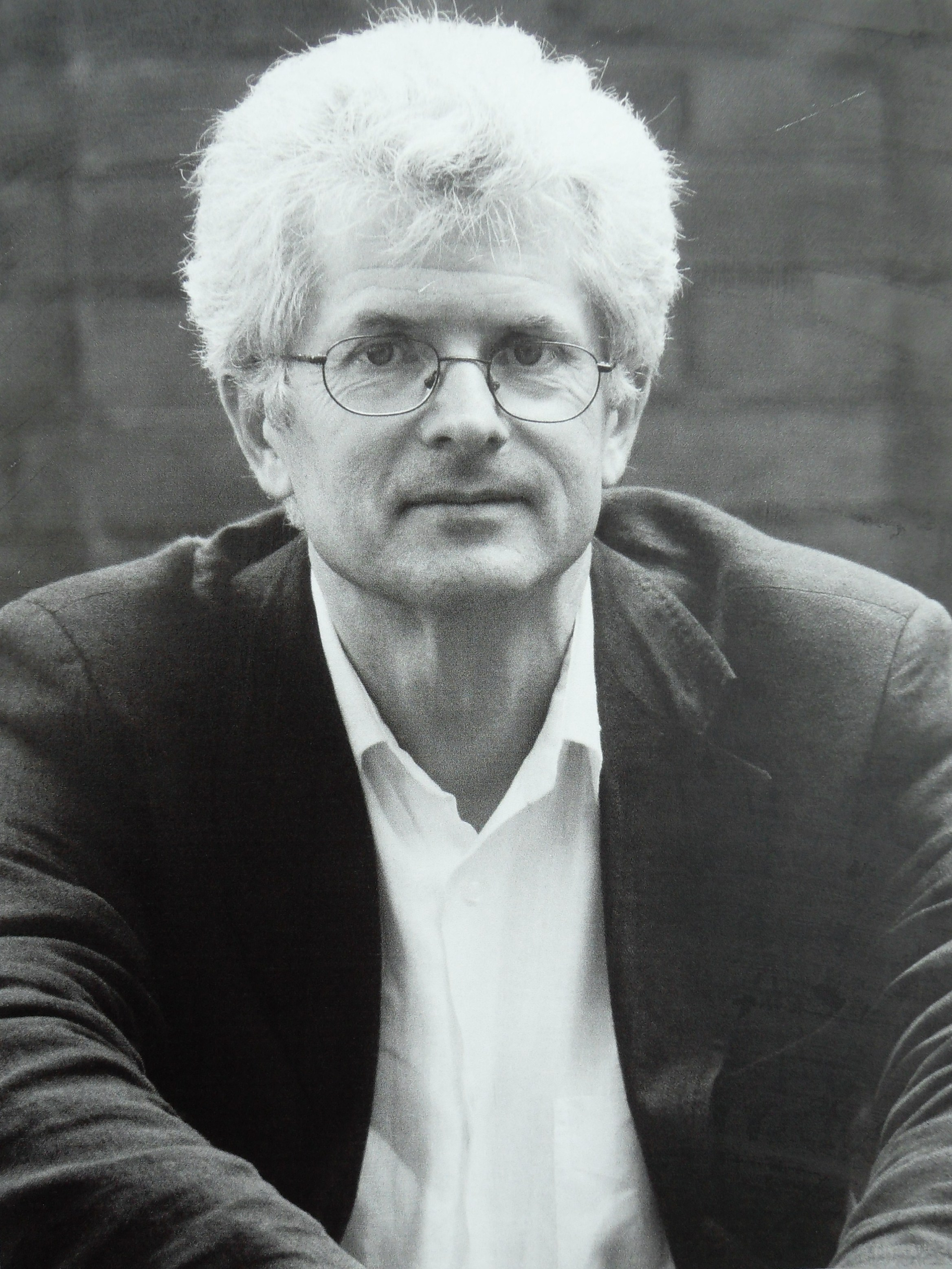 Gdańsk Wrzeszcz. Cmentarz Srebrzysko, fotografia na grobie Arkadiusza Rybickiego.